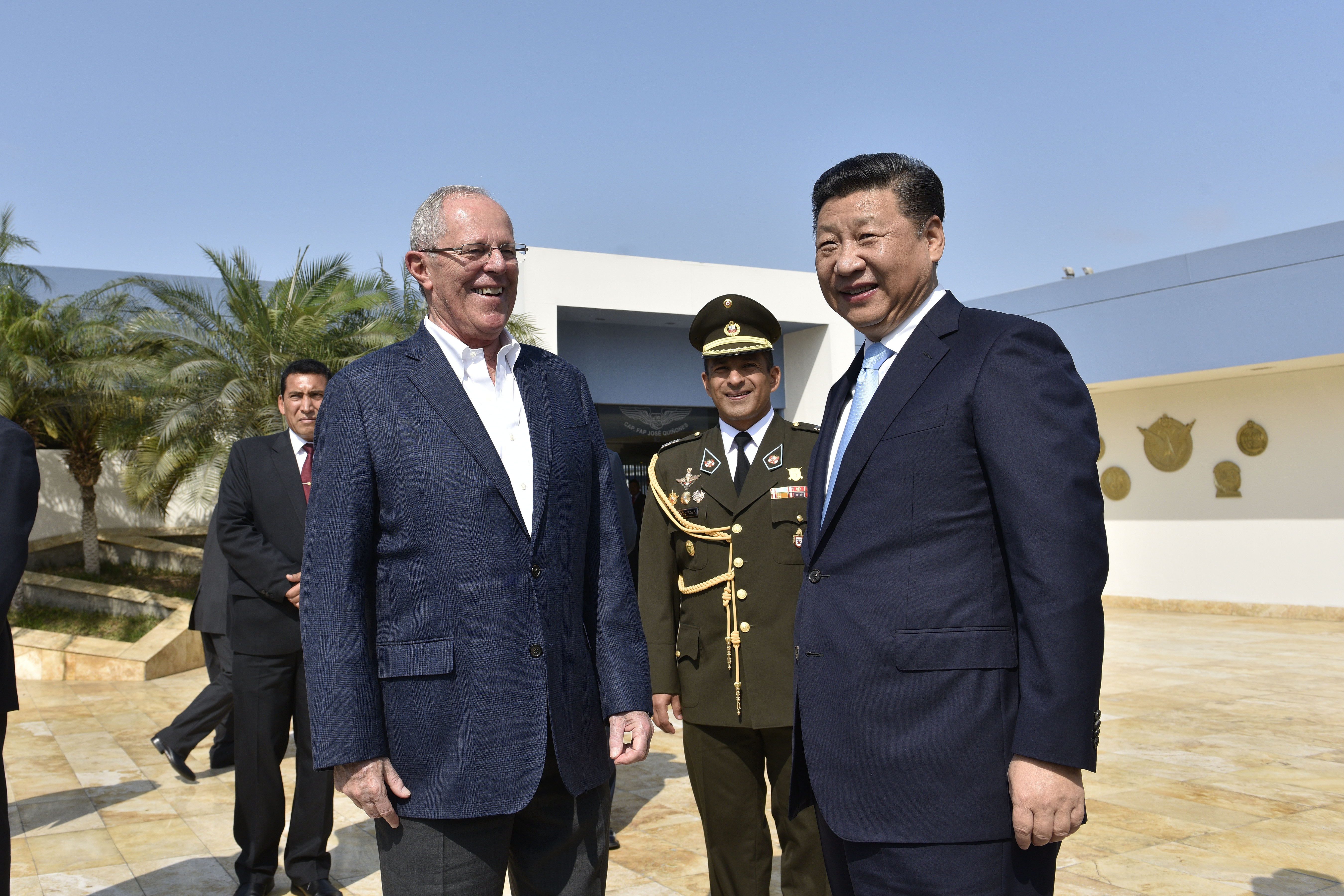 En una ceremonia protocolar realizada en el Grupo Aéreo N° 8 en el Callao, esta mañana, el Presidente Pedro Pablo Kuczynski junto al Canciller Ricardo Luna despidieron al Presidente de la República Popular China Xi Jinping, quien realizó una Visita de Estado a nuestro país.